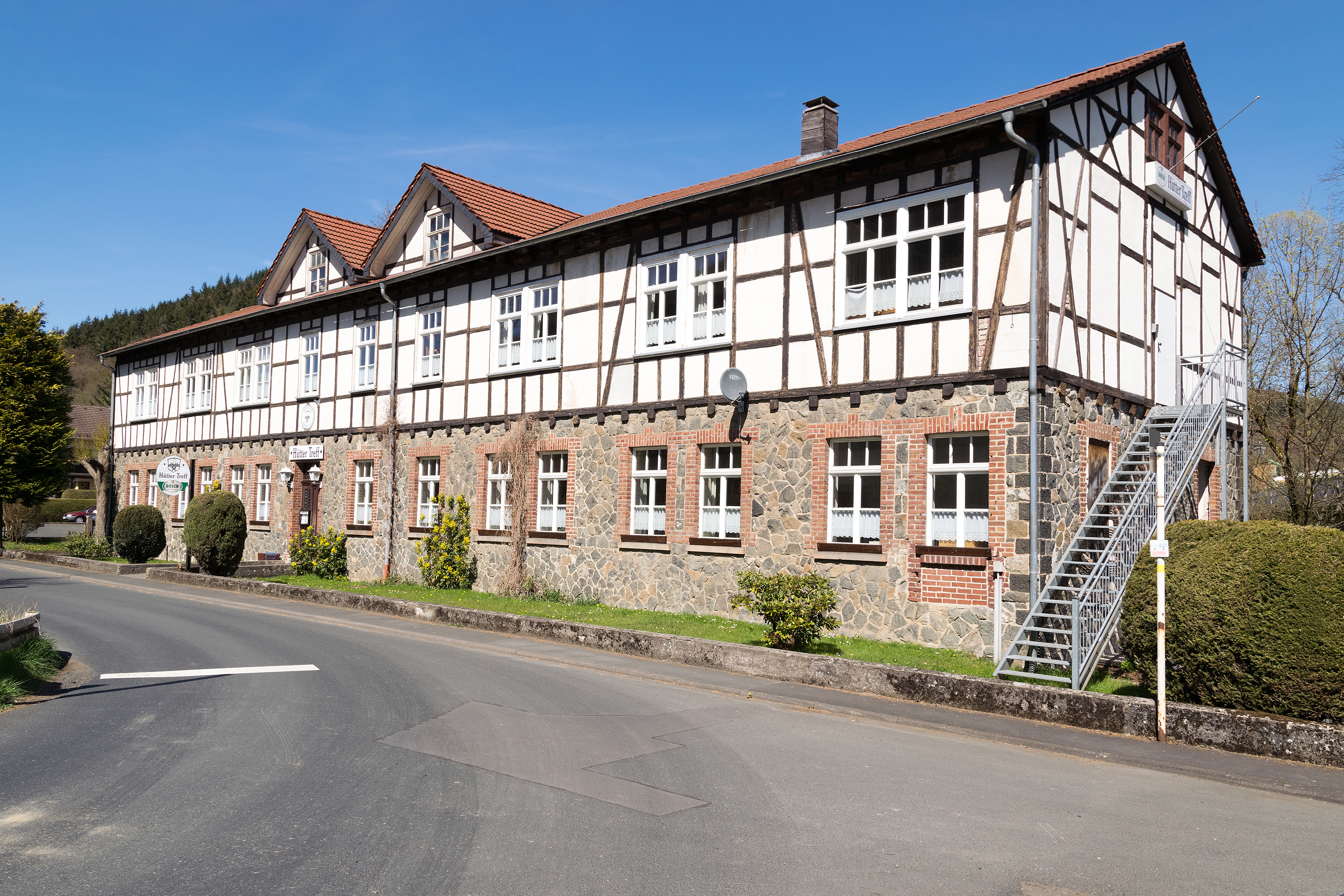 Ehem. Verwaltungsgebäude der Buderus'schen Eisenwerke Wetzlar in Ludwigshütte (Biedenkopf)